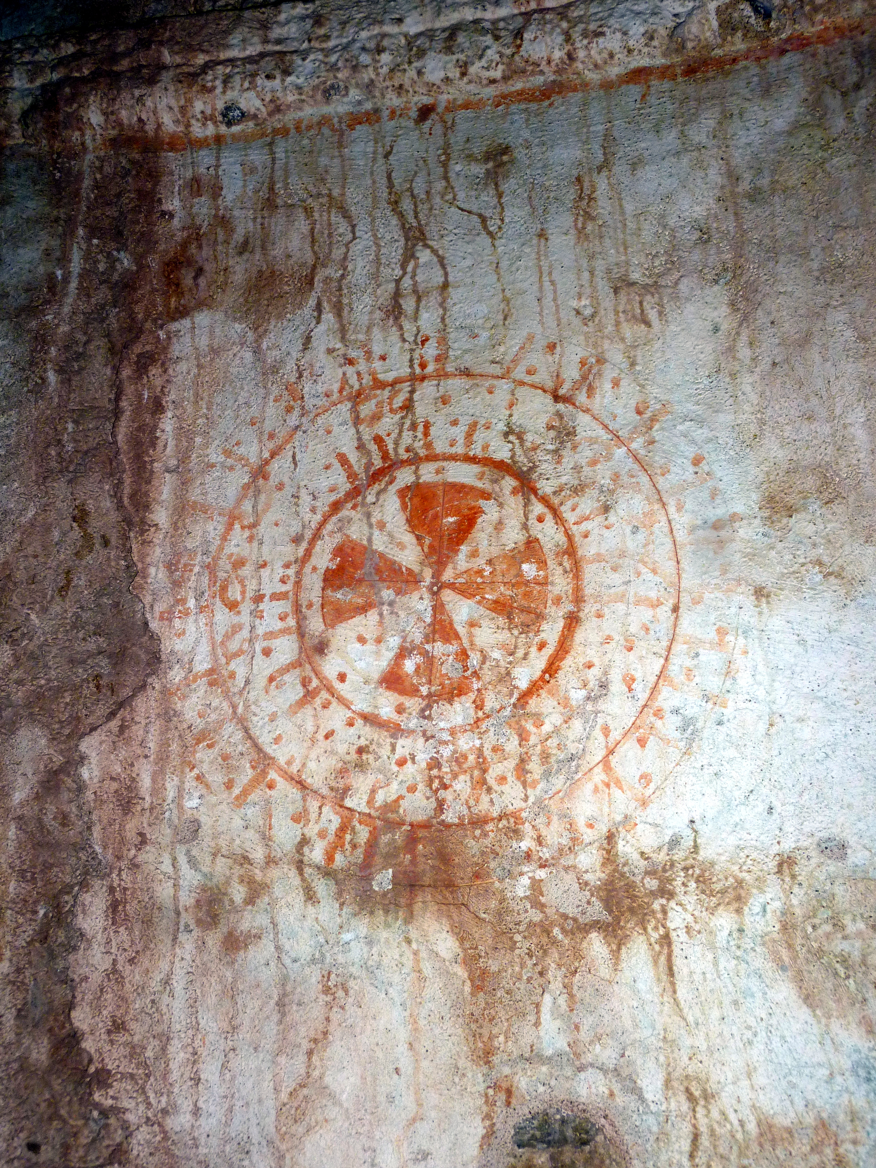 Detall d'un motiu pictòric a l'interior de l'església de Sant Joan de Mussols (municipi d'Albanyà, Alt Empordà)